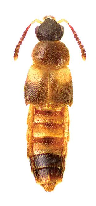 Phymatura blanchardi